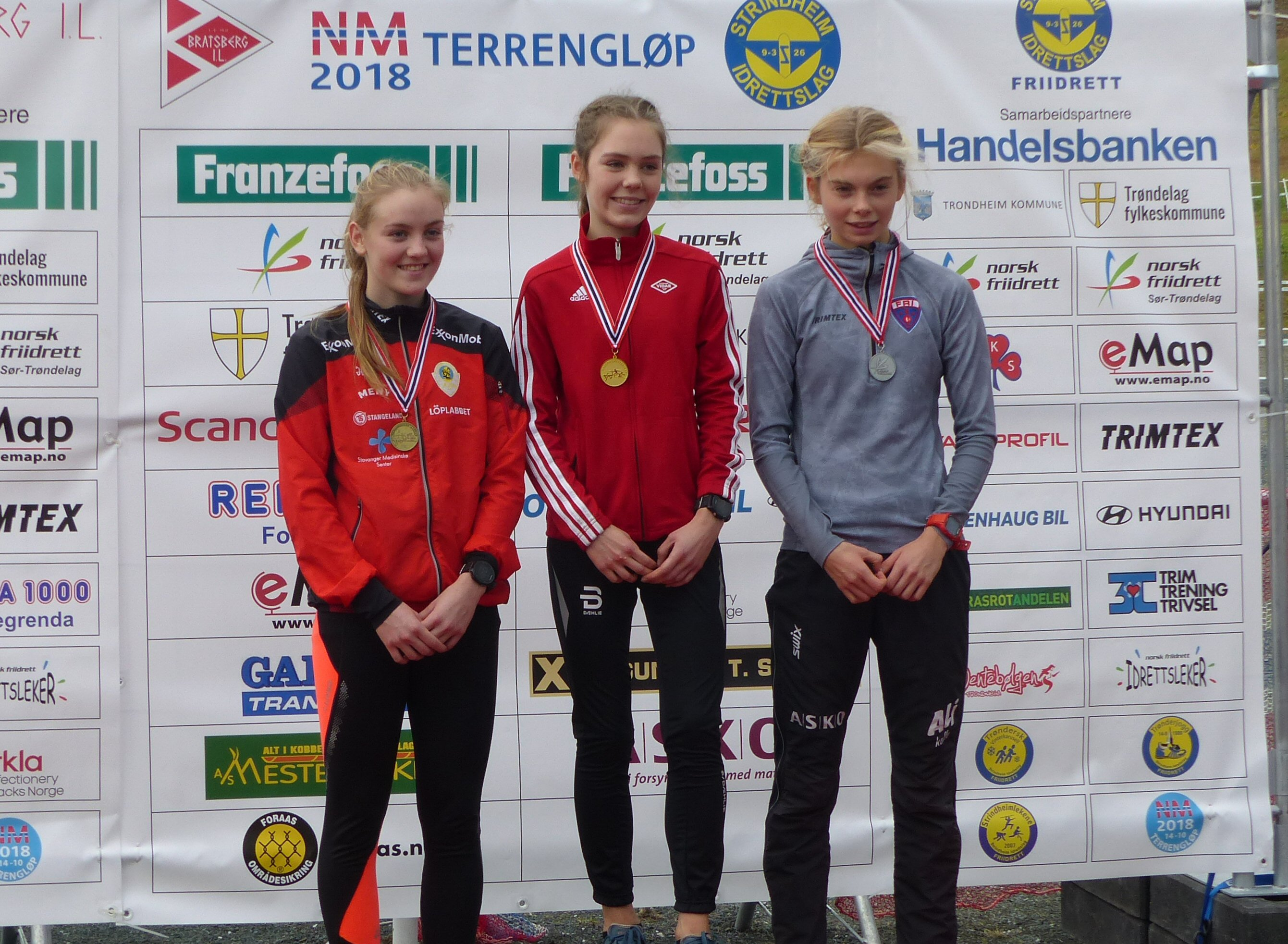 NM i terrengløp, lang løype, Bratsberg - Trondheim, 2018. Seierspallen for klassen J17.